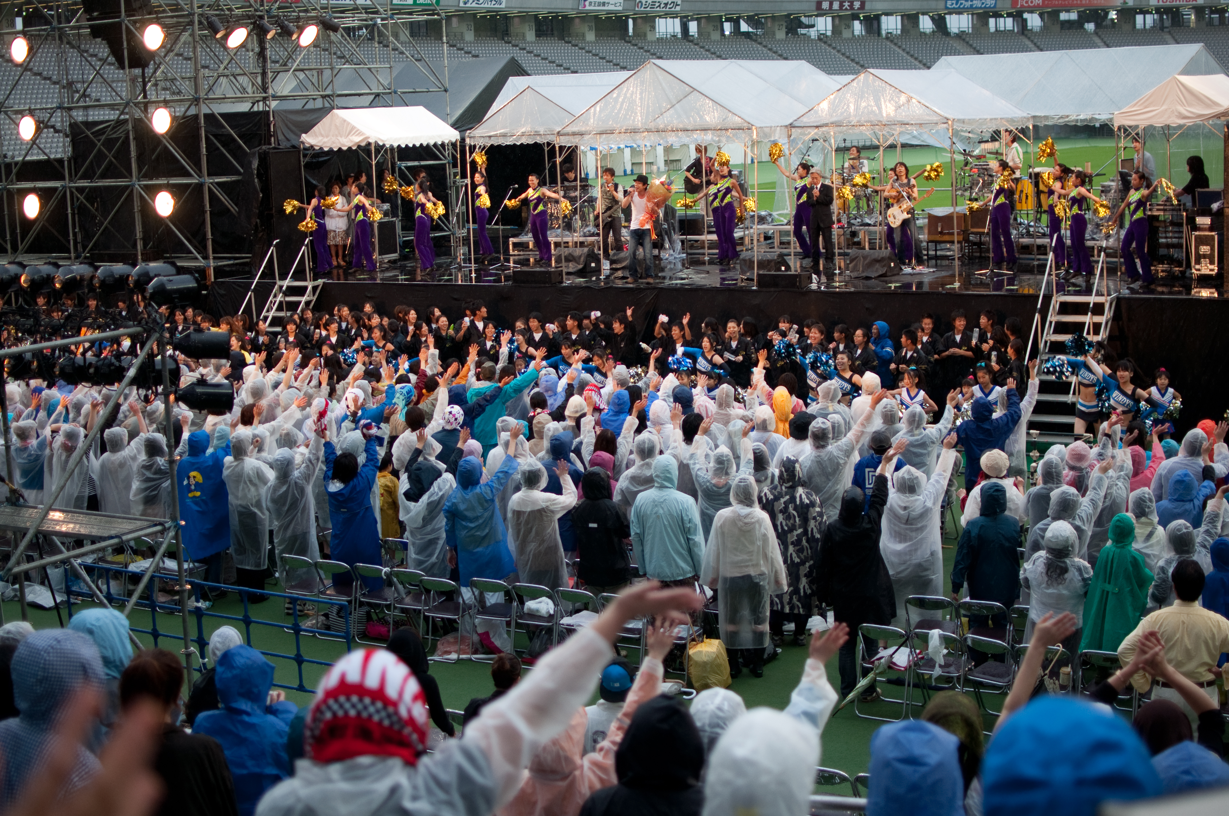 第3回味の素スタジアム感謝デー [1]